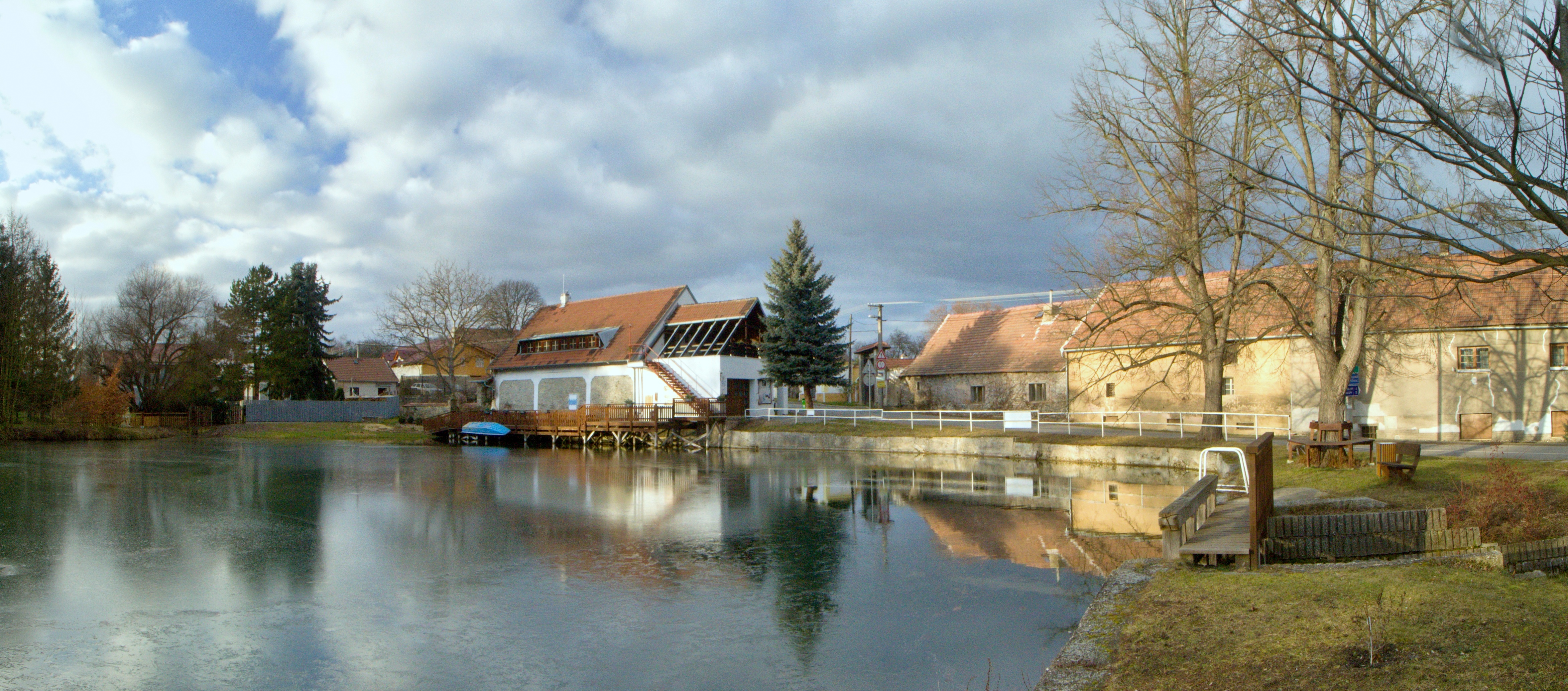 Libochovičky, okres Kladno